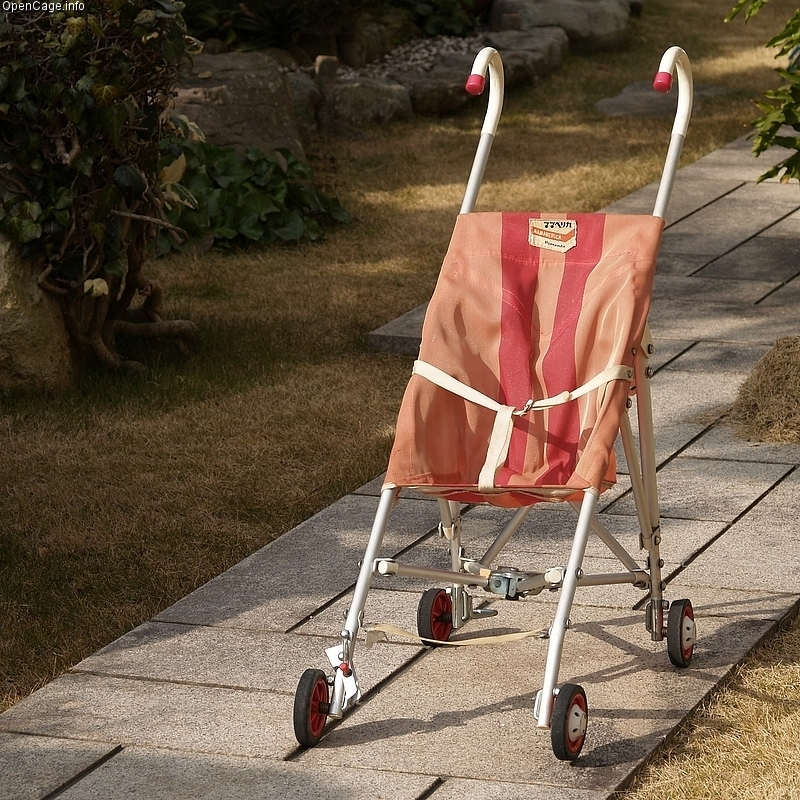 任天堂が昭和40年代に発売していたベビーカー「ママベリカ」 NINTENDO sold stroller called "MAMABERIKA"